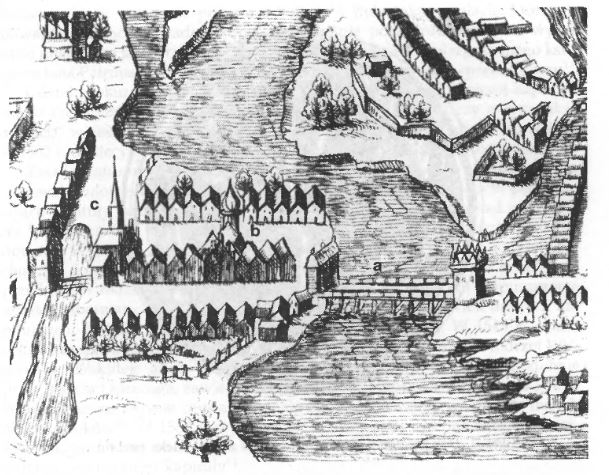 Widok Chwaliszewa. Fragment widoku perspektywicznego Poznania z dzieła Civitates Orbis Terrarum z 1618 a) most Chwaliszewski b) ratusz Chwaliszewski c) kościół p.w. Św. Barbary